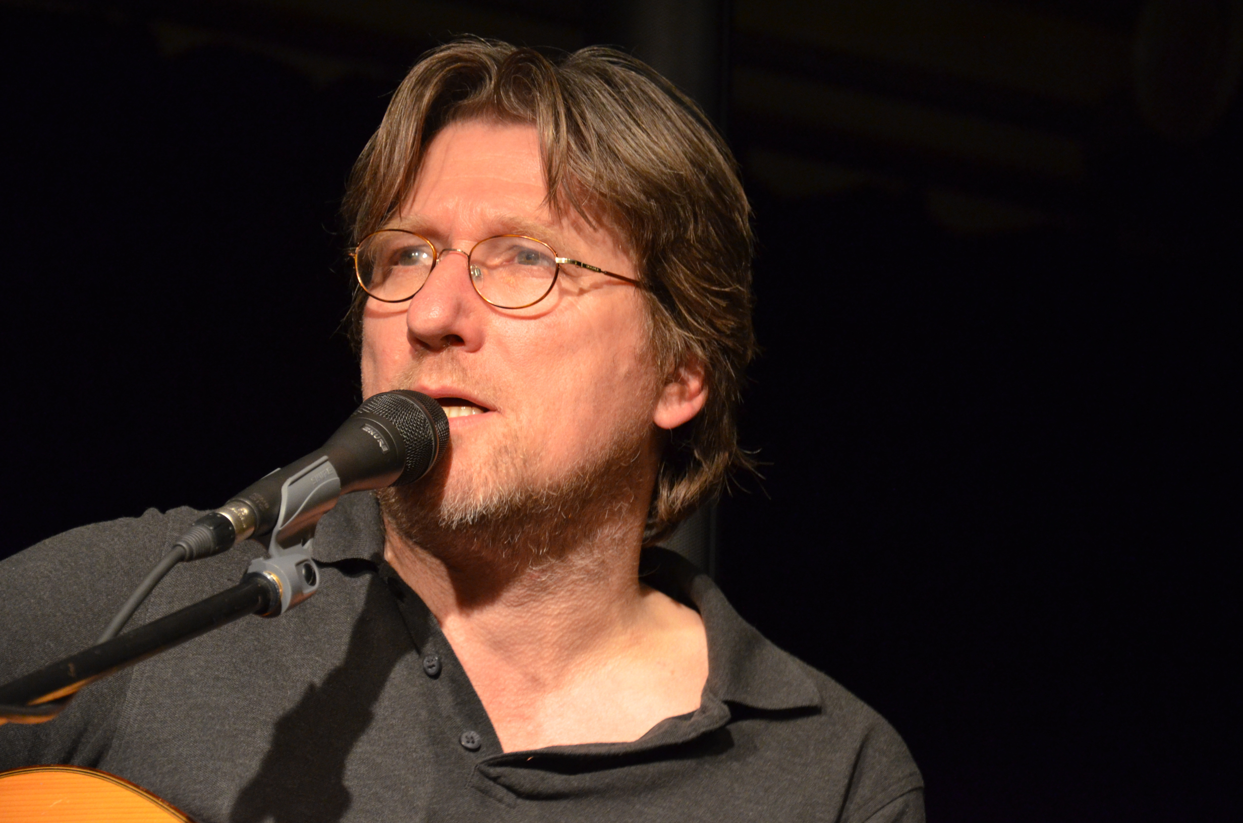 Konzert von Michael Fitz, 2012 in Lüdinghausen